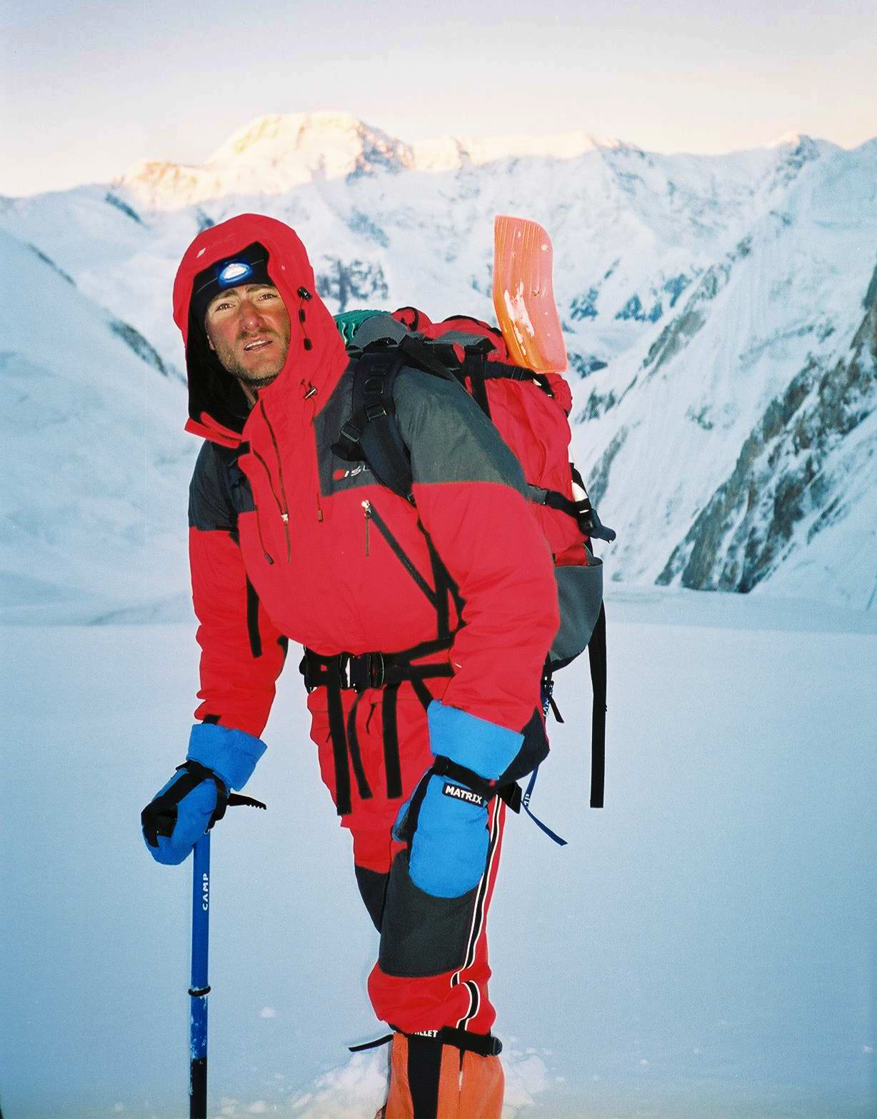 Alar Sikk